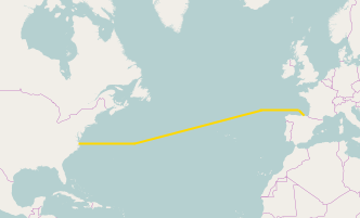 Схематична мапа MAREA — трансатлантичного телекомунікаційного оптичного кабелю, який компанії Facebook і Microsoft планують прокласти по дну північної частини Атлантичного океану до жовтня 2017 року.